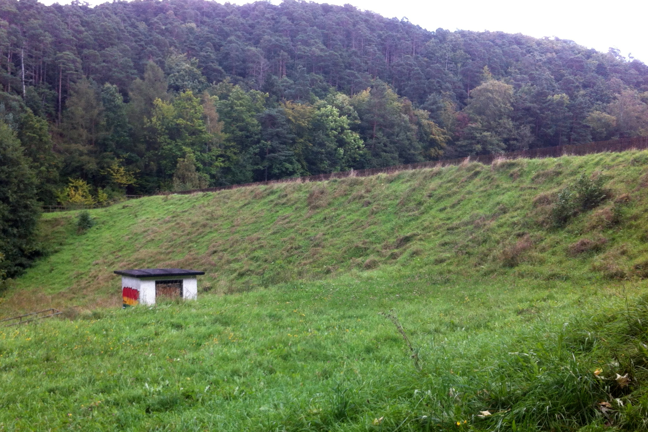 Osterteich Wall